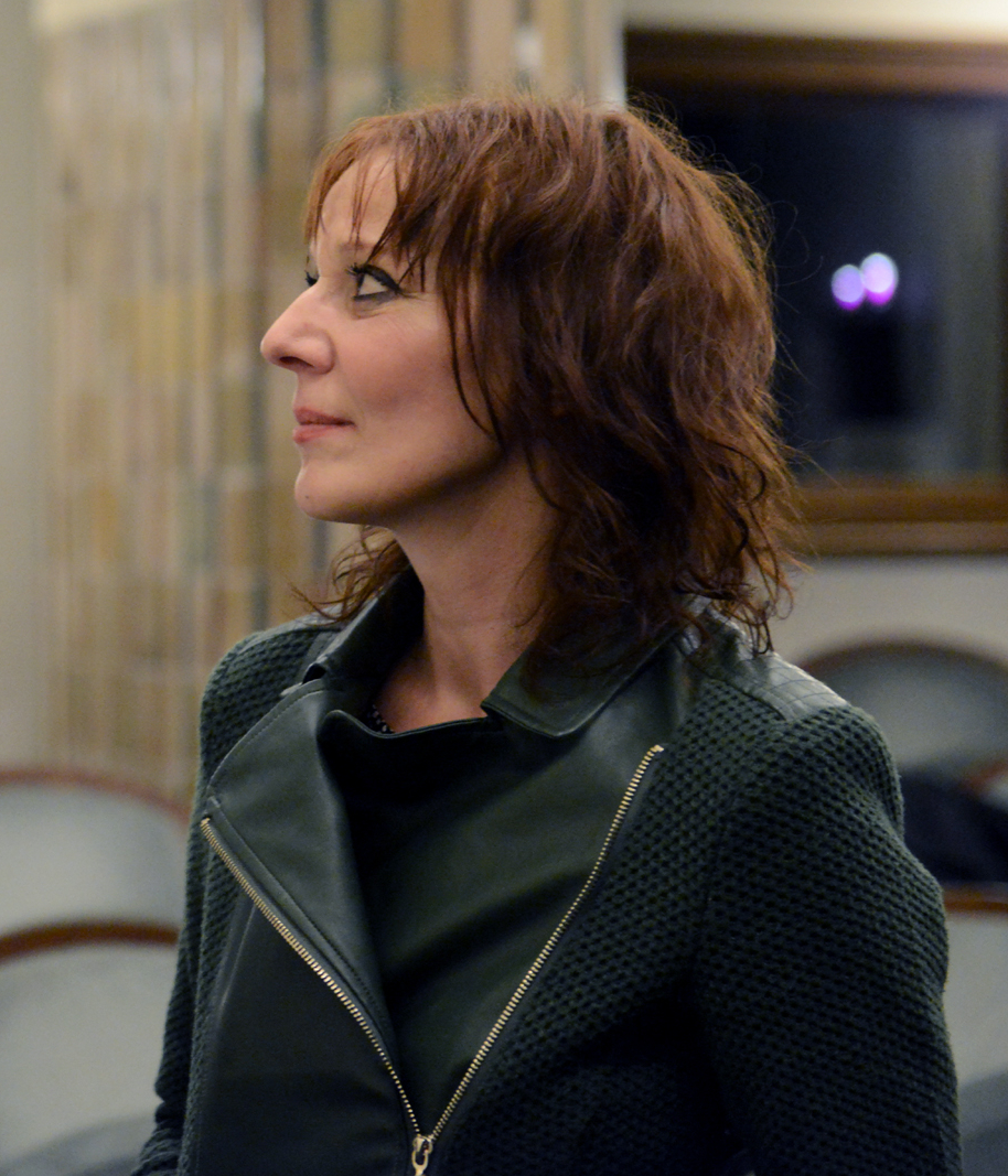 Szidi Tobias